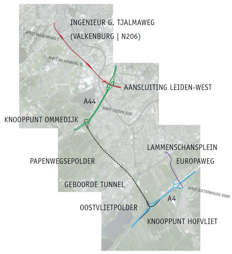 Kaart van de volledige RijnlandRoute